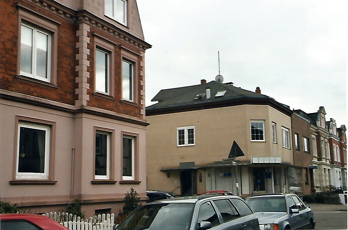 Kamerastandort für den Tatort der Sendung "In der Nacht zum Ostermontag" aus der Krimireihe Stahlnetz